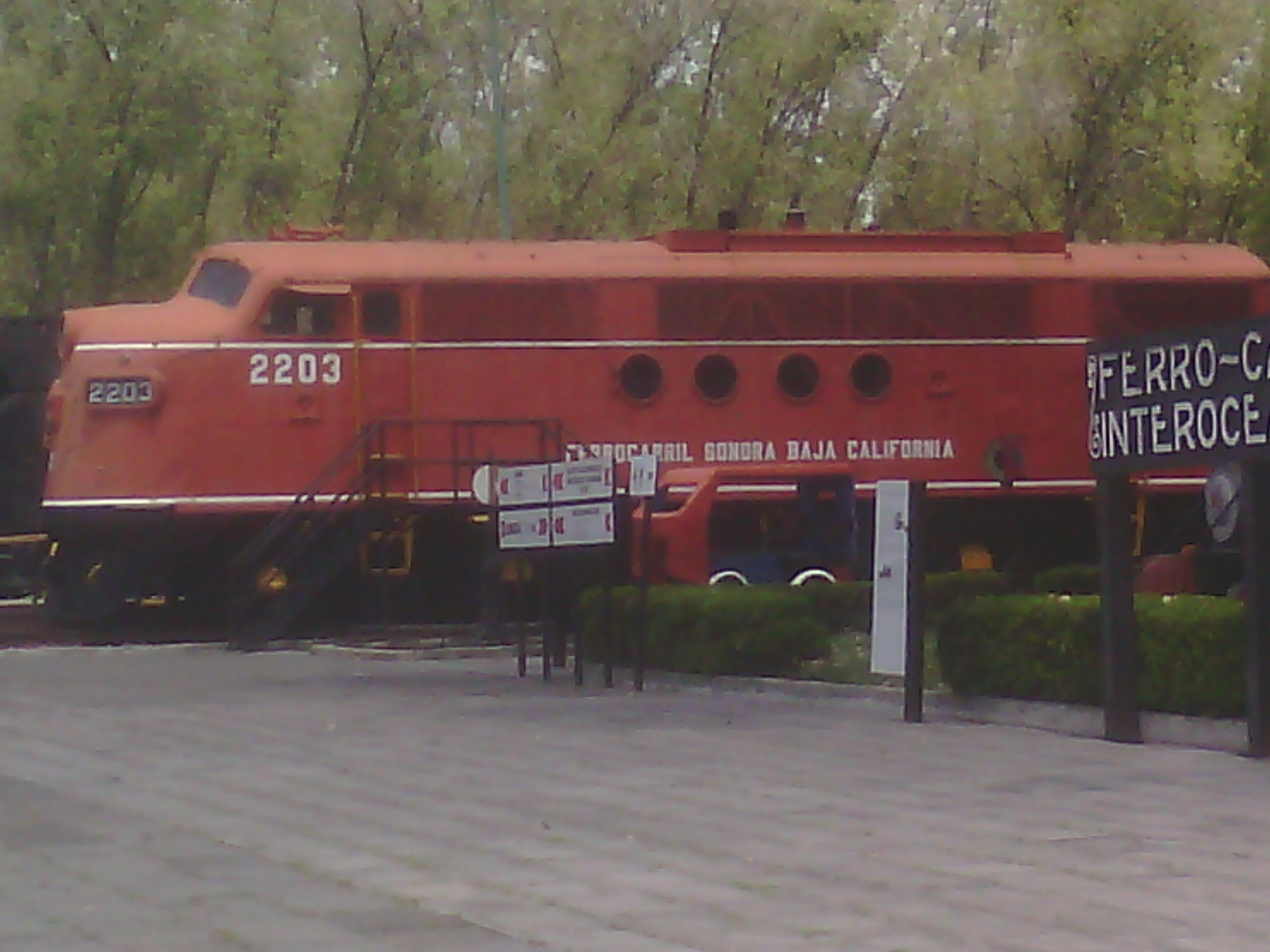 este es otro Ferrocarril del Museo de los Ferrocarriles Mexicanos